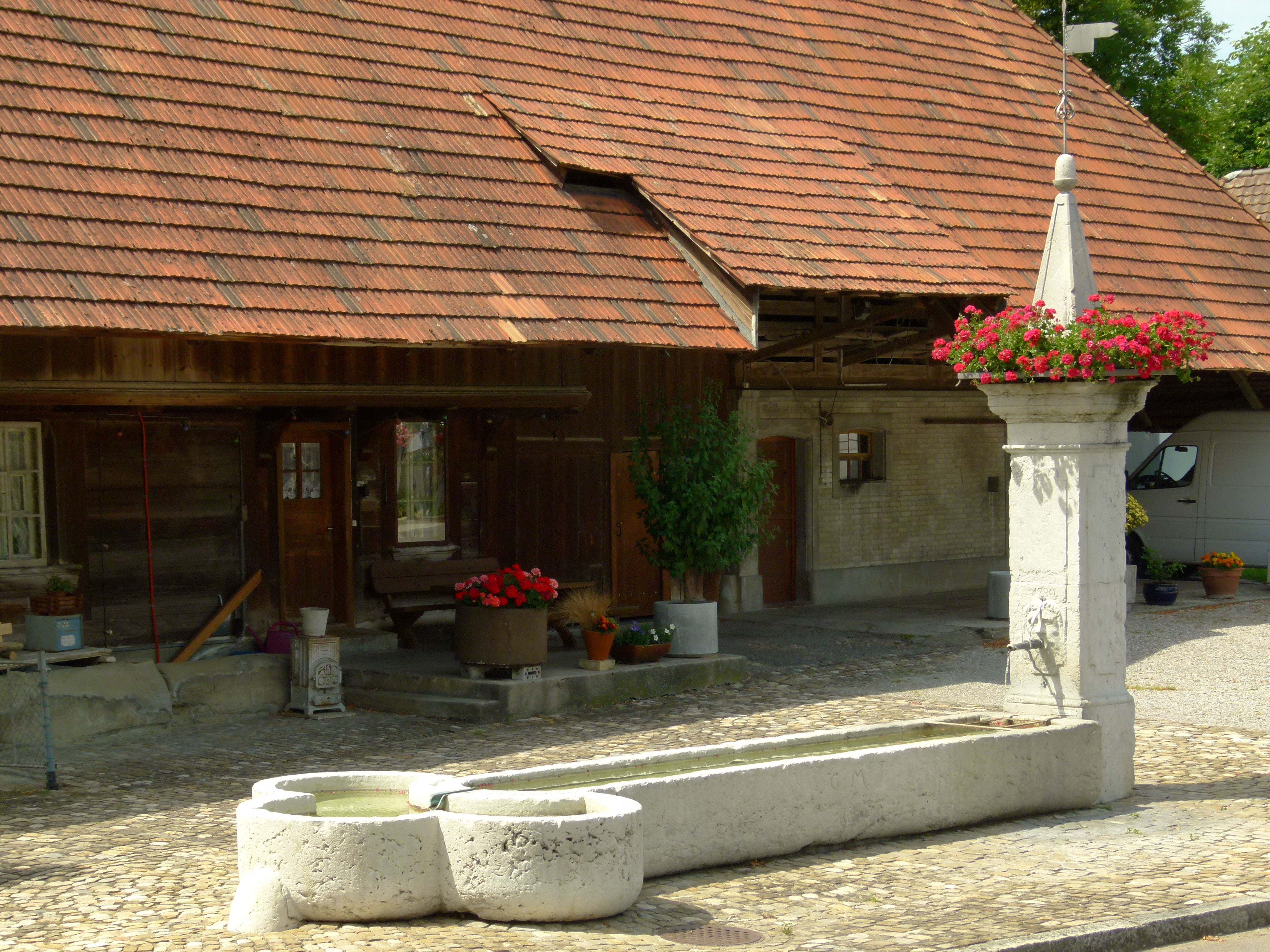 Dorfbrunnen in Mattstetten Ch. Vor Bauernhaus